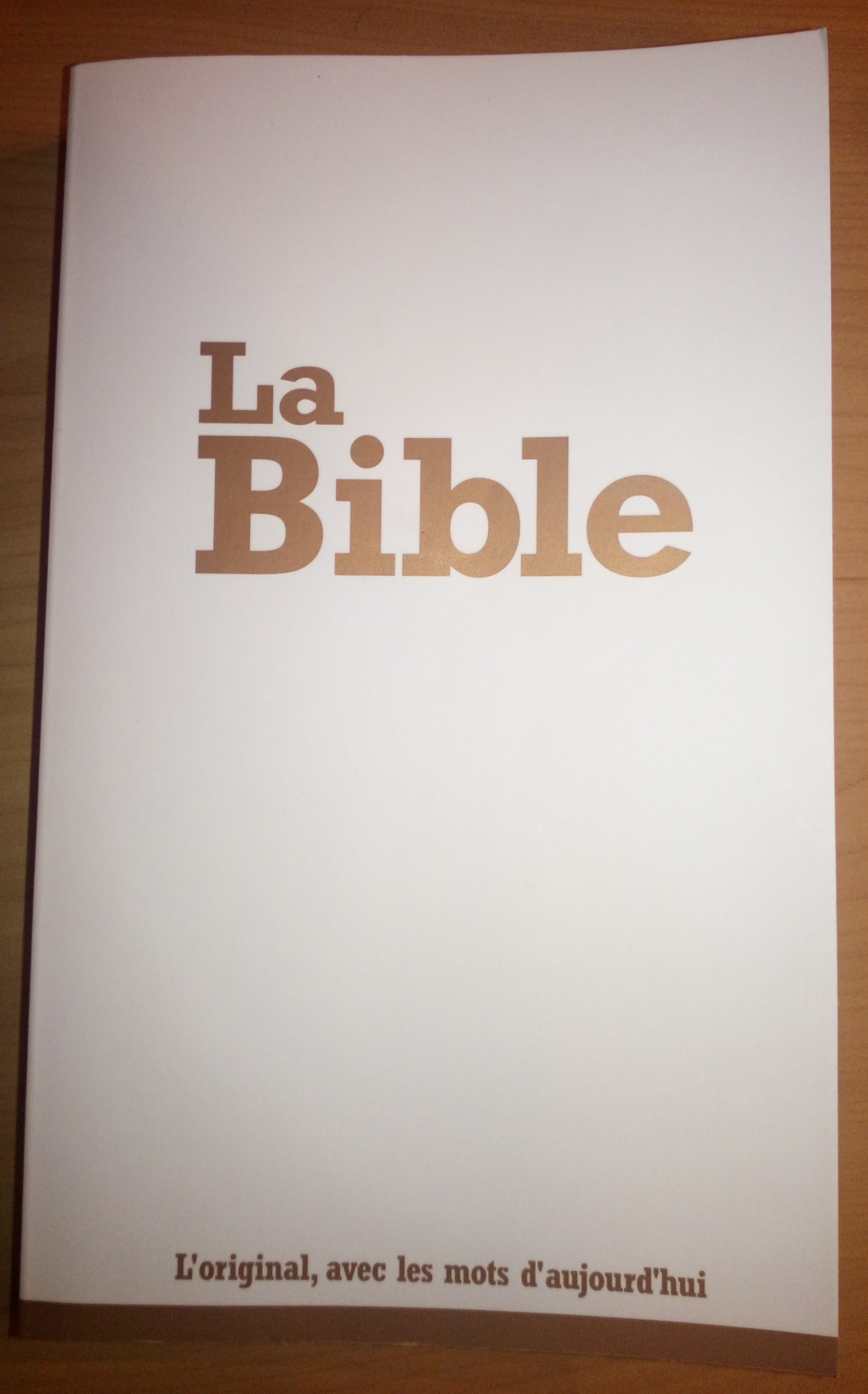 Bible Louis Segond 21 (17ème éd., 2015).